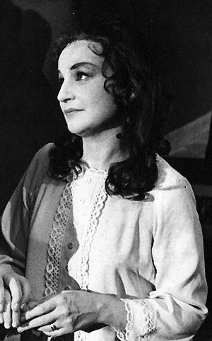 Margareta Hallin